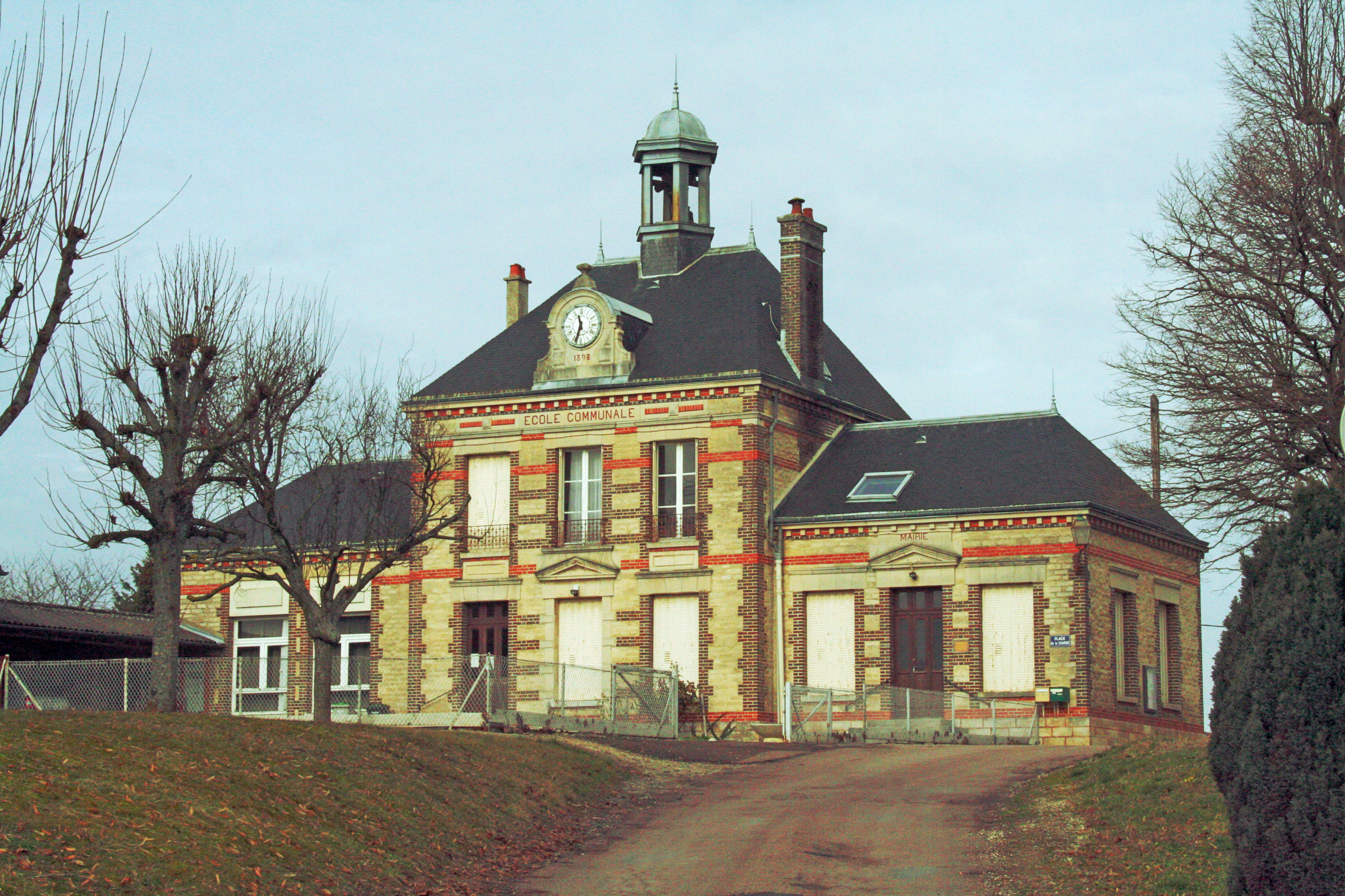 mairie de Souligny dans l'Aube (France)